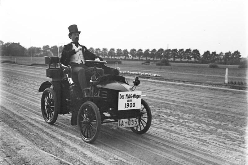 So fuhr der Kavalier im Jahre 1900! Eines der ersten Automobile aus dem Jahre 1900 bei der Vorführung auf dem Sommerfest der Sport-Presse in Berlin-Ruhleben.